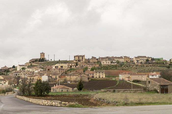 Entrada a Valleruela de Pedraza con gran cantidad de ovejas a la derecha.